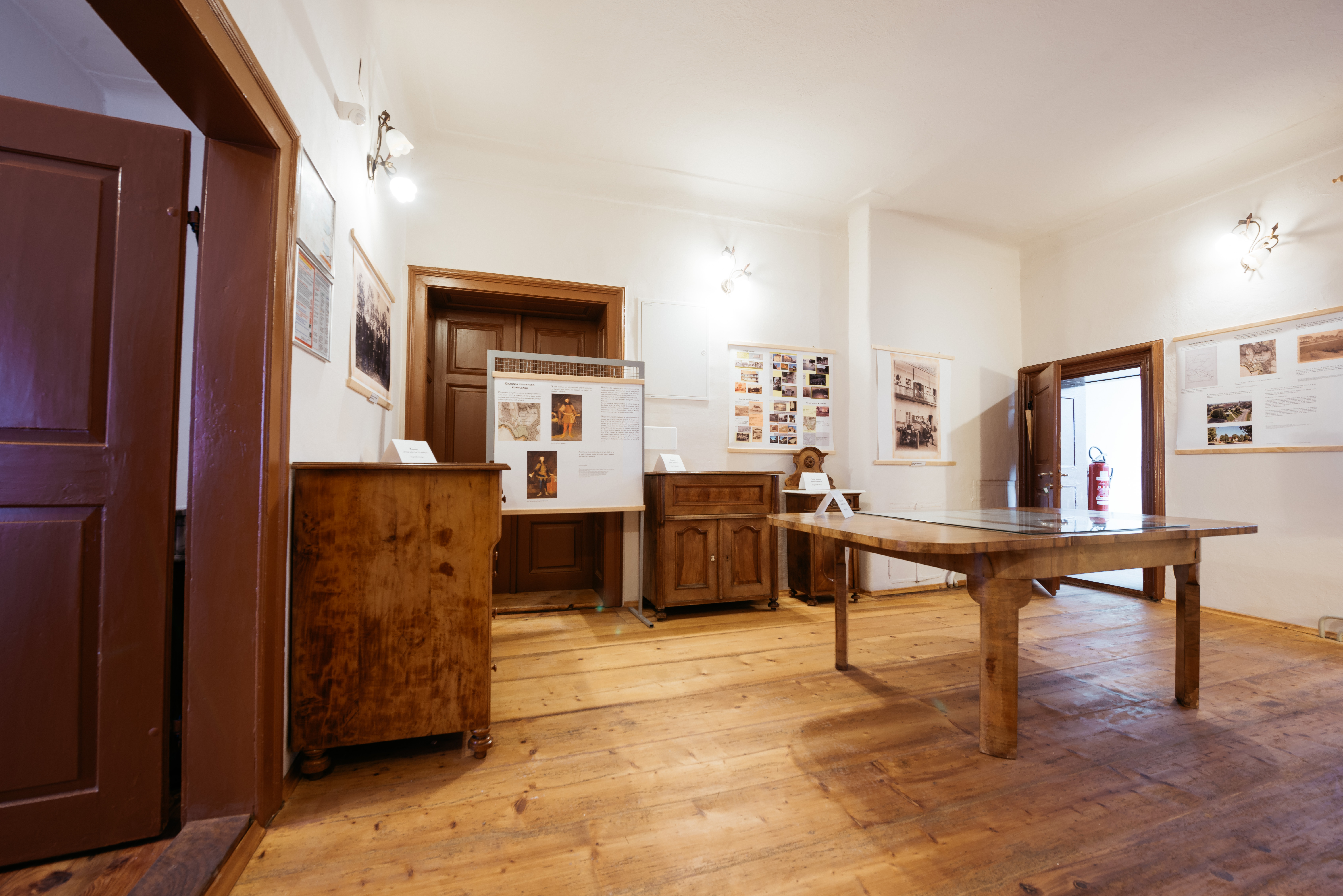 Reprodukcija fotografij